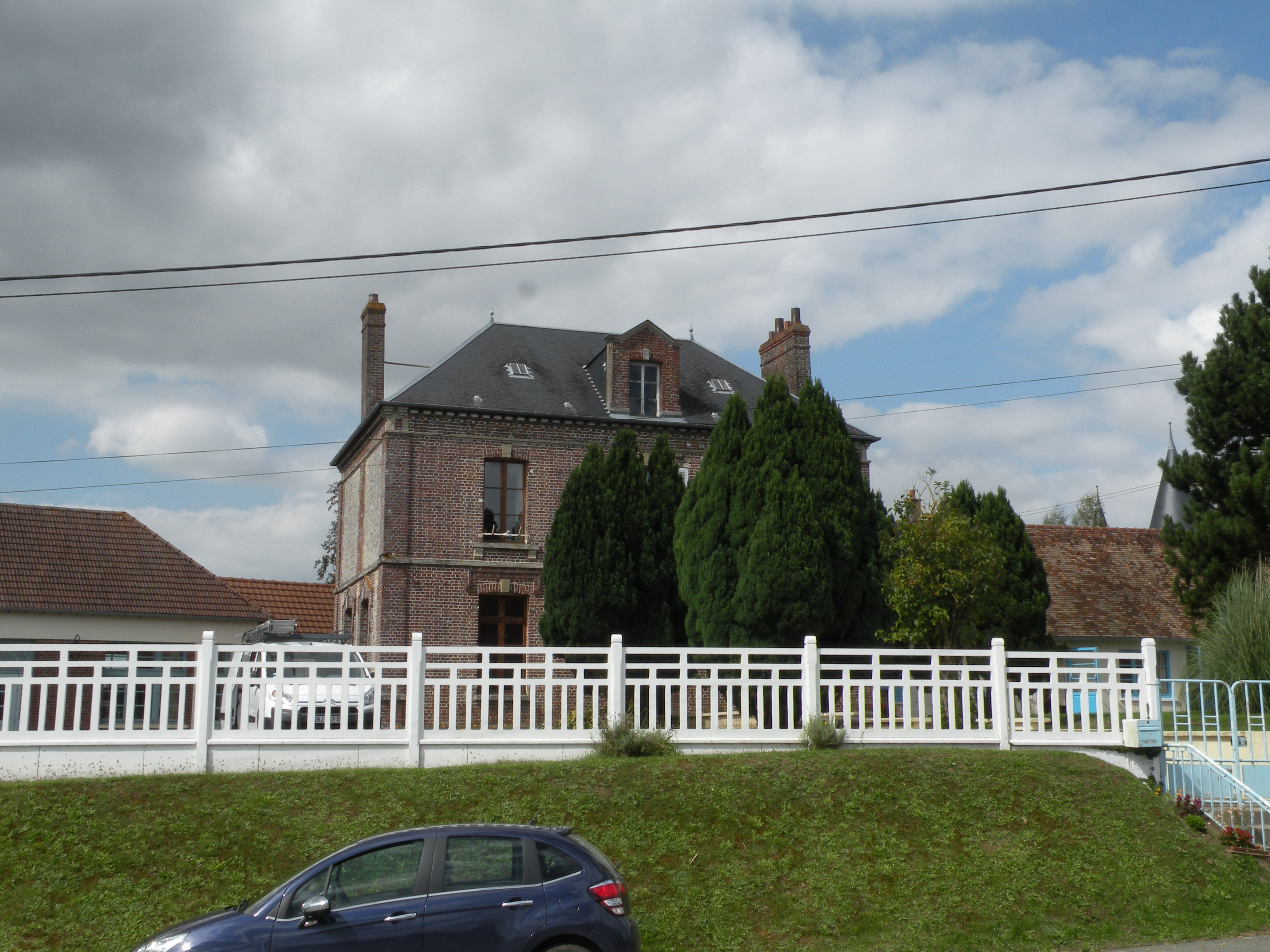 Hannaches